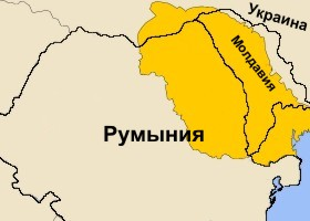 карта Молдавского княжества в период своего наибольшего расширения на фоне границ современных государств